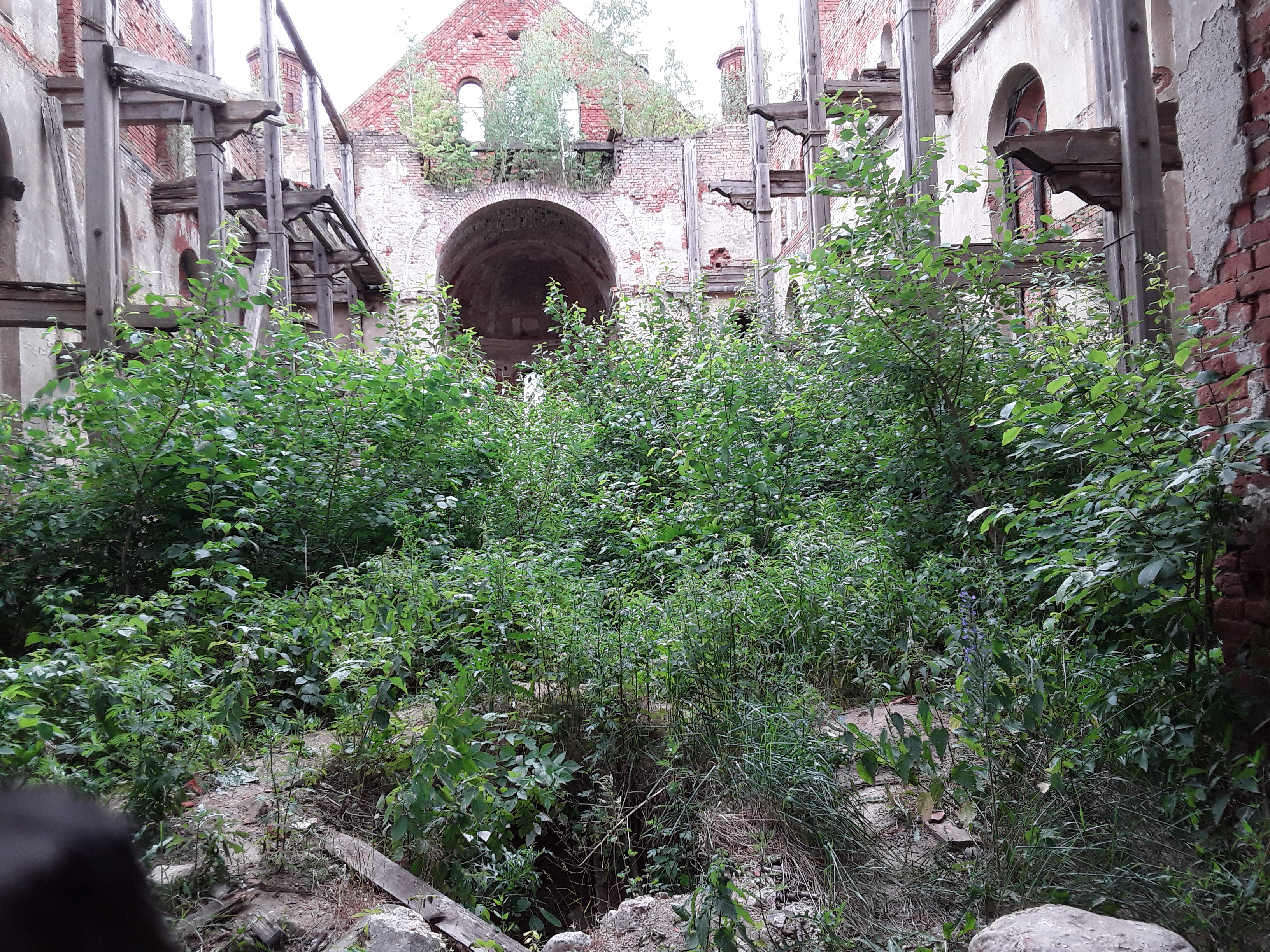 Innenansicht der ehem. Evangelische Kirche Darkehmen / Angerapp